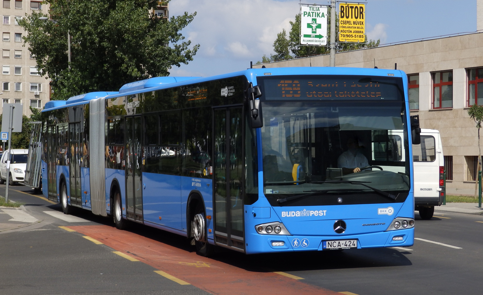 159-es busz a Kossuth Lajos utcában